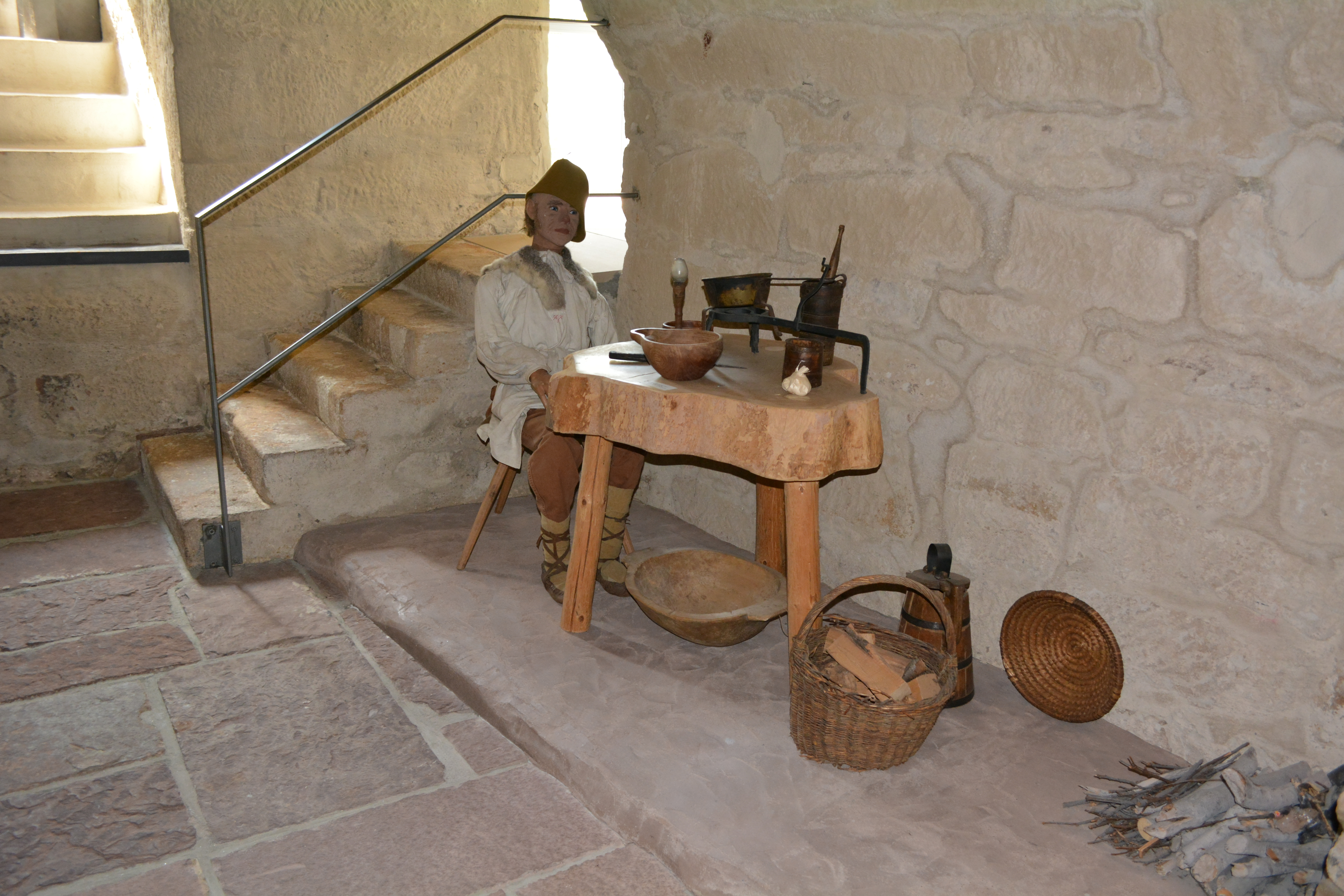 Dies ist der erste Raum des Museums. In diesem befindet sich eine alltägliche Szene, wie es wahrscheinlich um 1500 ausgesehen haben muss. Nicht im Bild ist die Feuerstelle. Die Kleidung der Puppe entspricht etwa dem, was man damals trug. Auf dem Tisch befinden sich alltägliche Gegenstände.